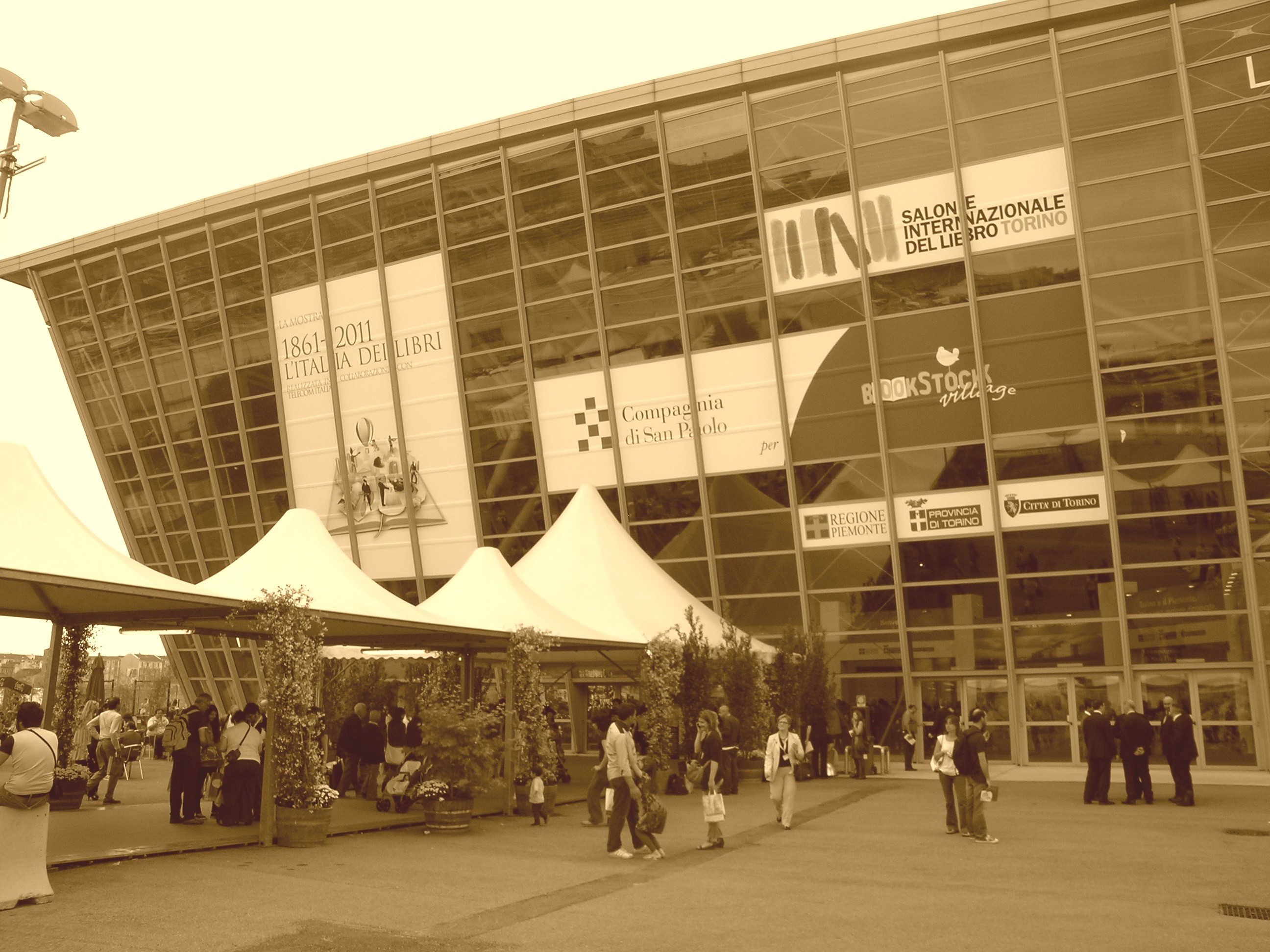 L'Oval Lingotto, sede della mostra "1861-2011 L'Italia dei libri" al Salone 2011.